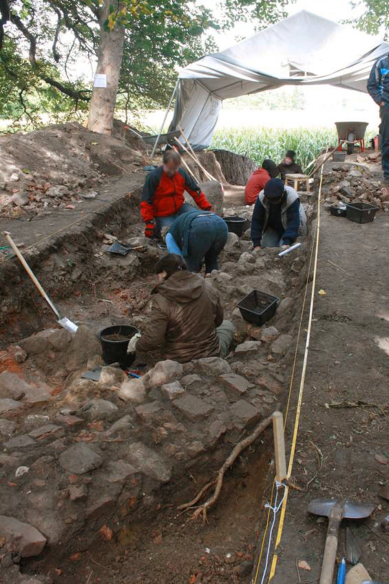 Burg Wölpe